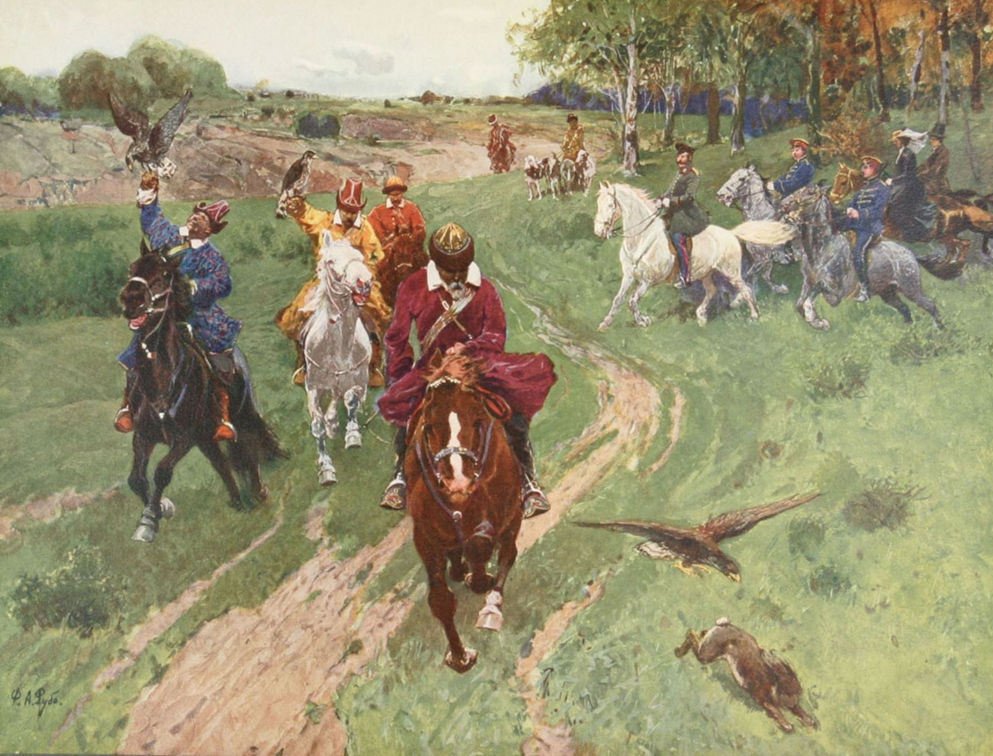 В 1856 году Фахретдин Ишмухаметович Уметбаев возглавил башкирскую делегацию на коронации императора Александра II в Москве. За организацию охоты ловчими птицами во время коронации император Александр II подарил Фахретдину Уметбаеву бриллиантовый перстень. Сцена охоты ловчими птицами работы Ф. Рубо под названием «Охота башкир с соколами в присутствии императора Александра II» была опубликован в 1911 году в 4 томе очерка «Великокняжеская, царская и императорская охота на Руси» Н. И. Кутепова.